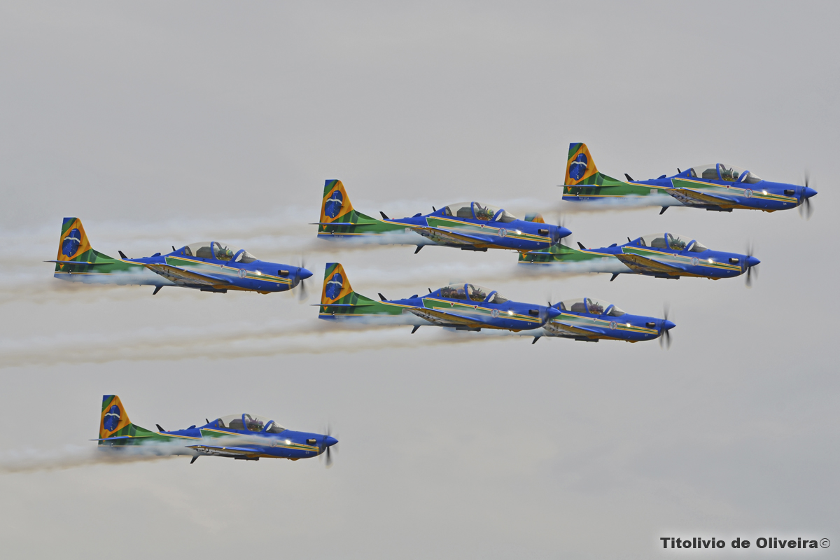 Sobrevoo das sete aeronaves A-29 Super Tucano durante o Domingo Aéreo da Academia da Força Aérea em Pirassununga no ano de 2014.